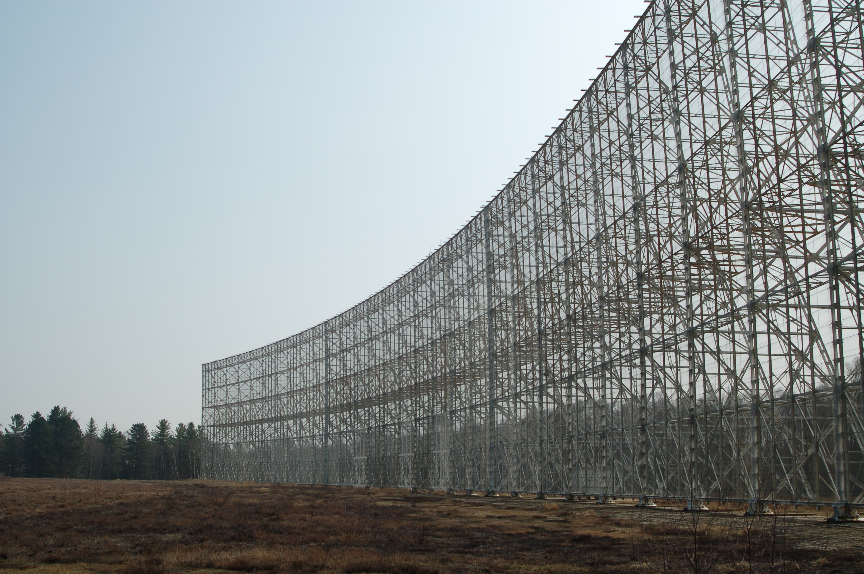 Le grand radiotélescope de Nançay (Cher), inauguré par De Gaulle en 1965.